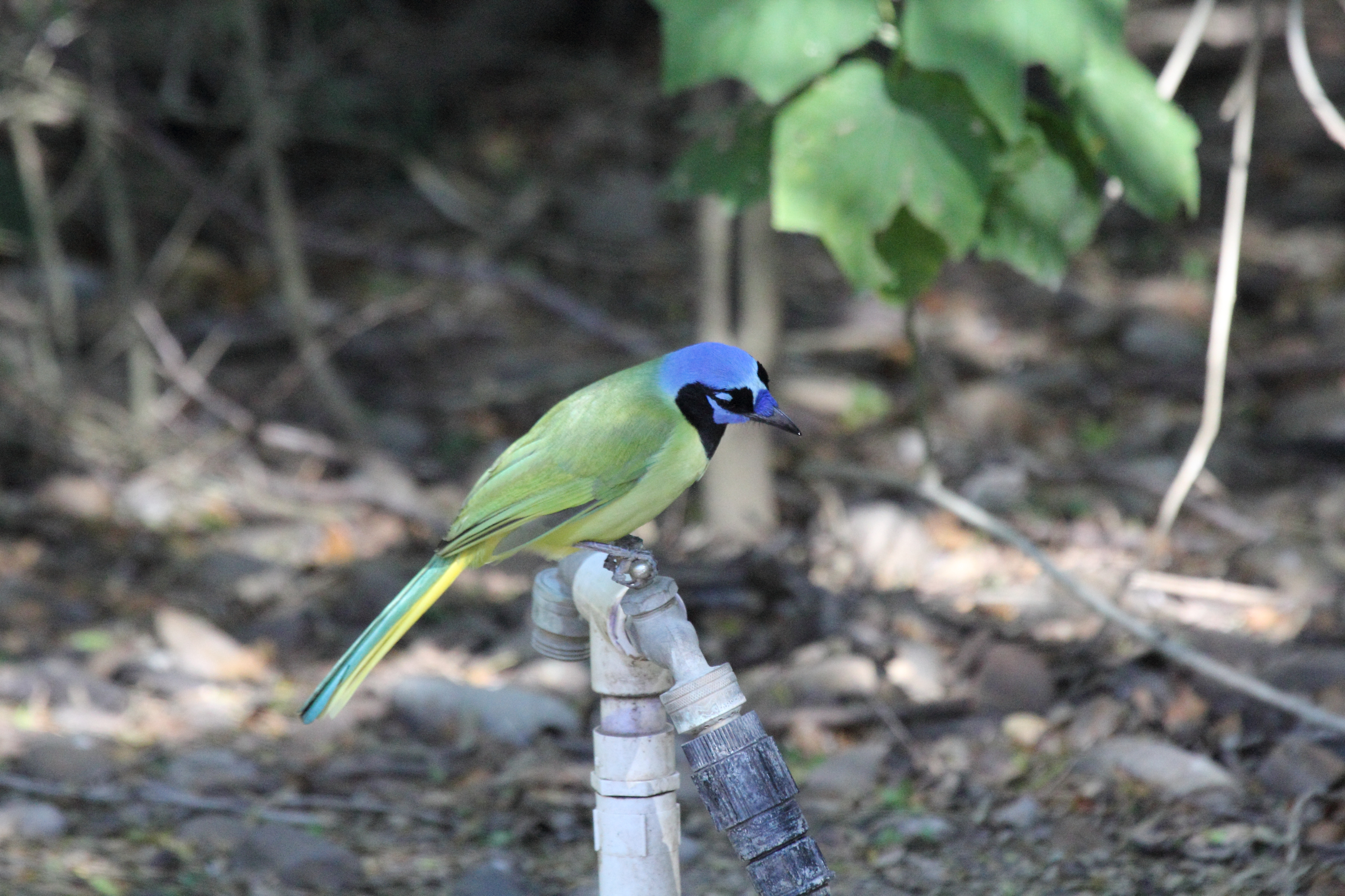 Green Jay (Cyanocorax luxosus)